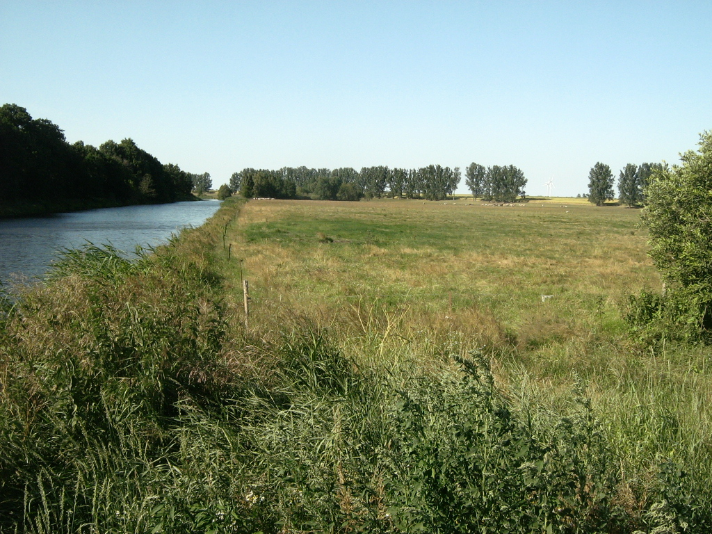 Der Trebelkanal hinter Tribsees. Er wurde 1957 gebaut und stellt den Anfang des nie fertig gestellten Küstenkanals dar.